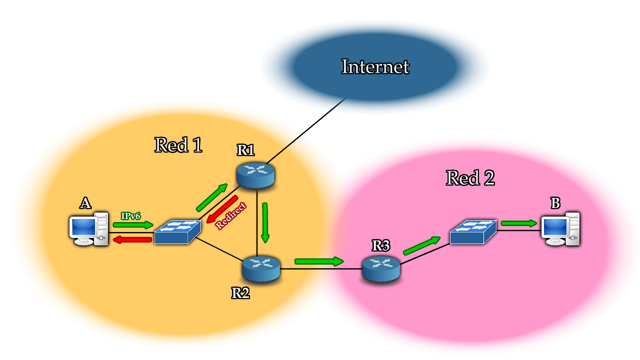 Situación en la que se genera un mensaje "Redirect" de Neighbor Discovery (IPv6).